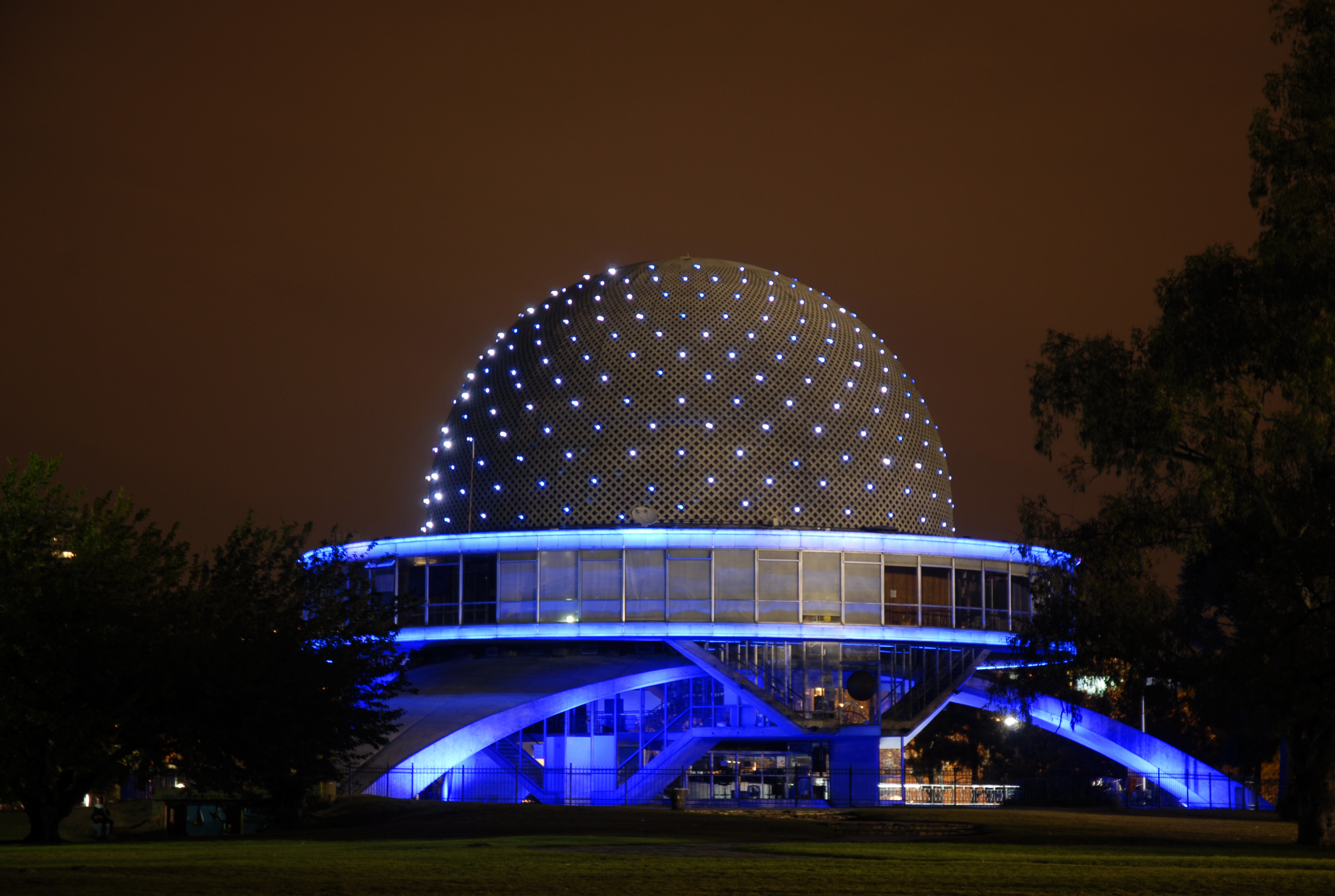 Campo de Deportes del Buenos Aires Cricket Club